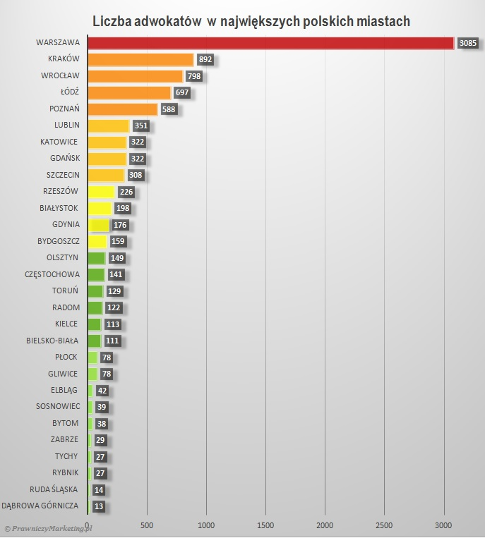 Diagram prezentuje liczbę adwokatów w największych polskich miastach w oparciu o dane z Krajowego Rejestru Adwokatów i Aplikantów Adwokackich oraz dane Głównego Urzędu Statystycznego na dzień 04.05.2015 r.